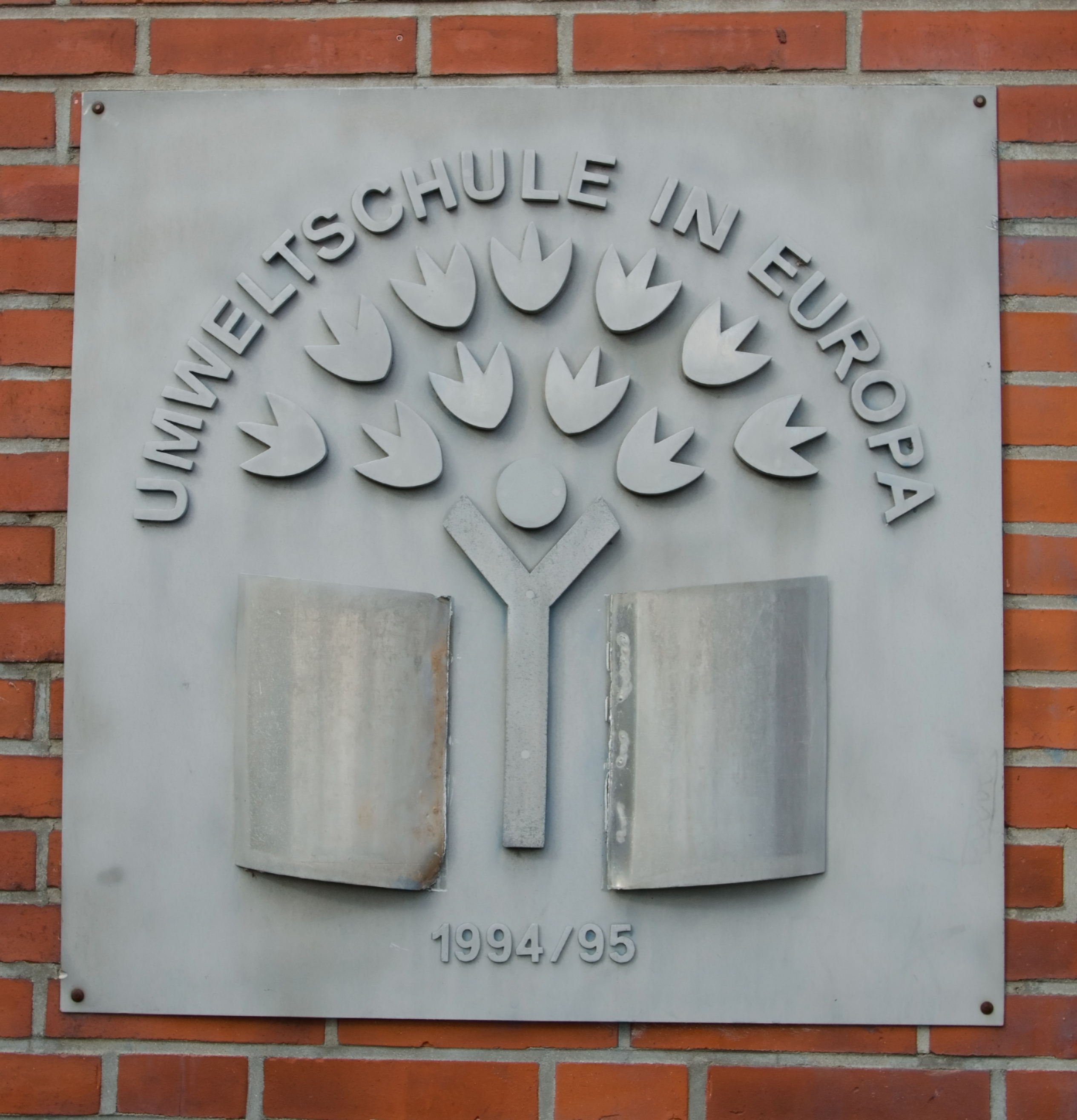 Tafel mit dem Logo "Umweltschule in Europa" 1994/95